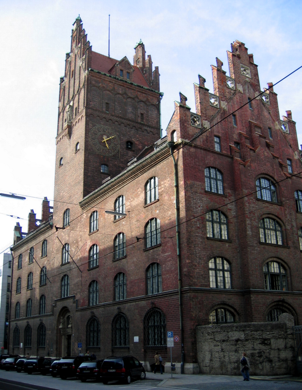 Description: Gebäude des Bayerischen Verfassungsgerichtshofes, des Oberlandesgerichtes und des Bayerischen Anwaltsgerichtshofes, Prielmayerstraße 5 in München (Germany) Source: selbst fotografiert Date: 14. Sept. 2005 Author: Bubo